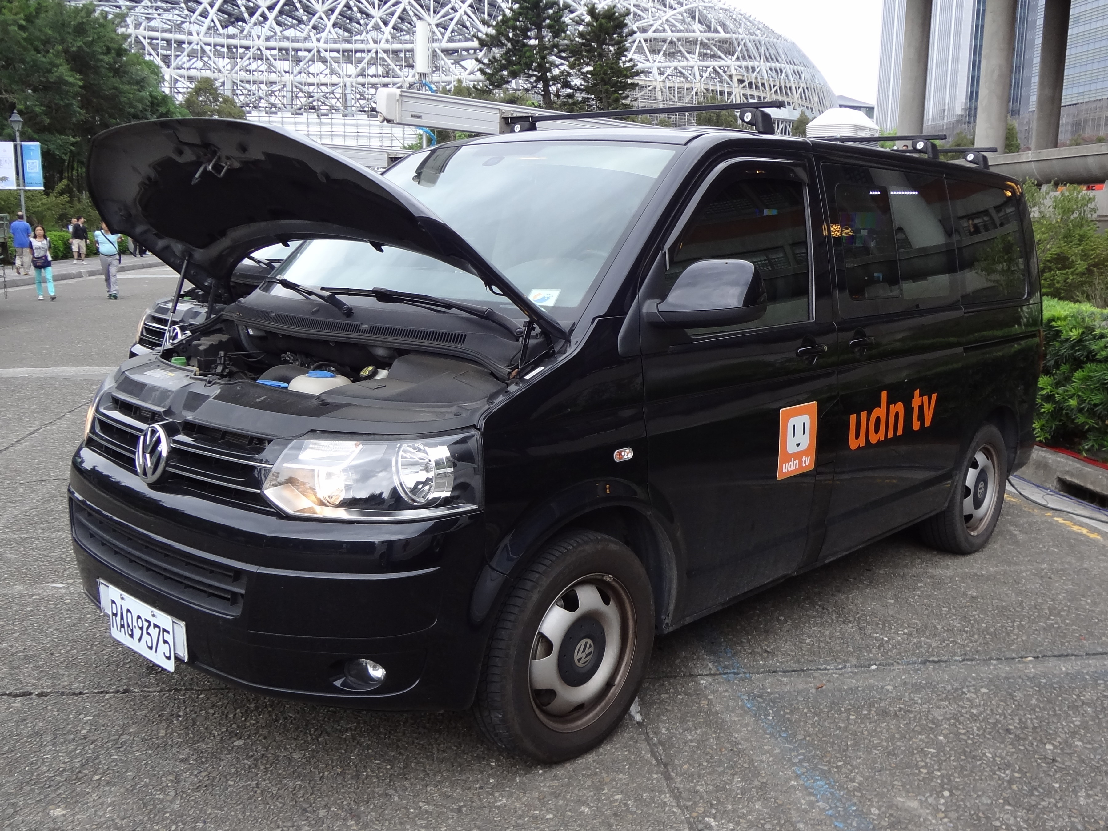 2015年（中華民國104年）第50屆金鐘獎電視金鐘獎星光大道，udn tv轉播車RAQ-9375。